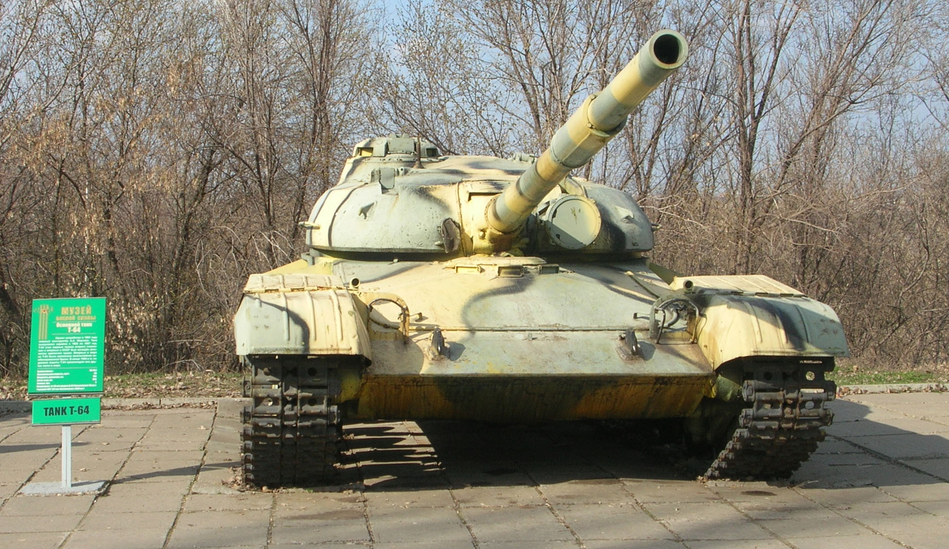 Танк Т-64. Парк Победы, г. Саратов.